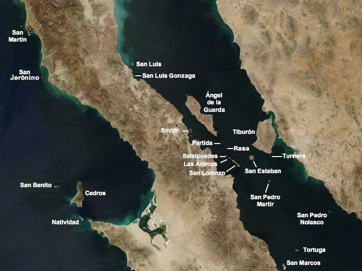 Es la parte.media septentrional de la peninsula, mostrando las islas.del golfo y algunas del Pacífico.